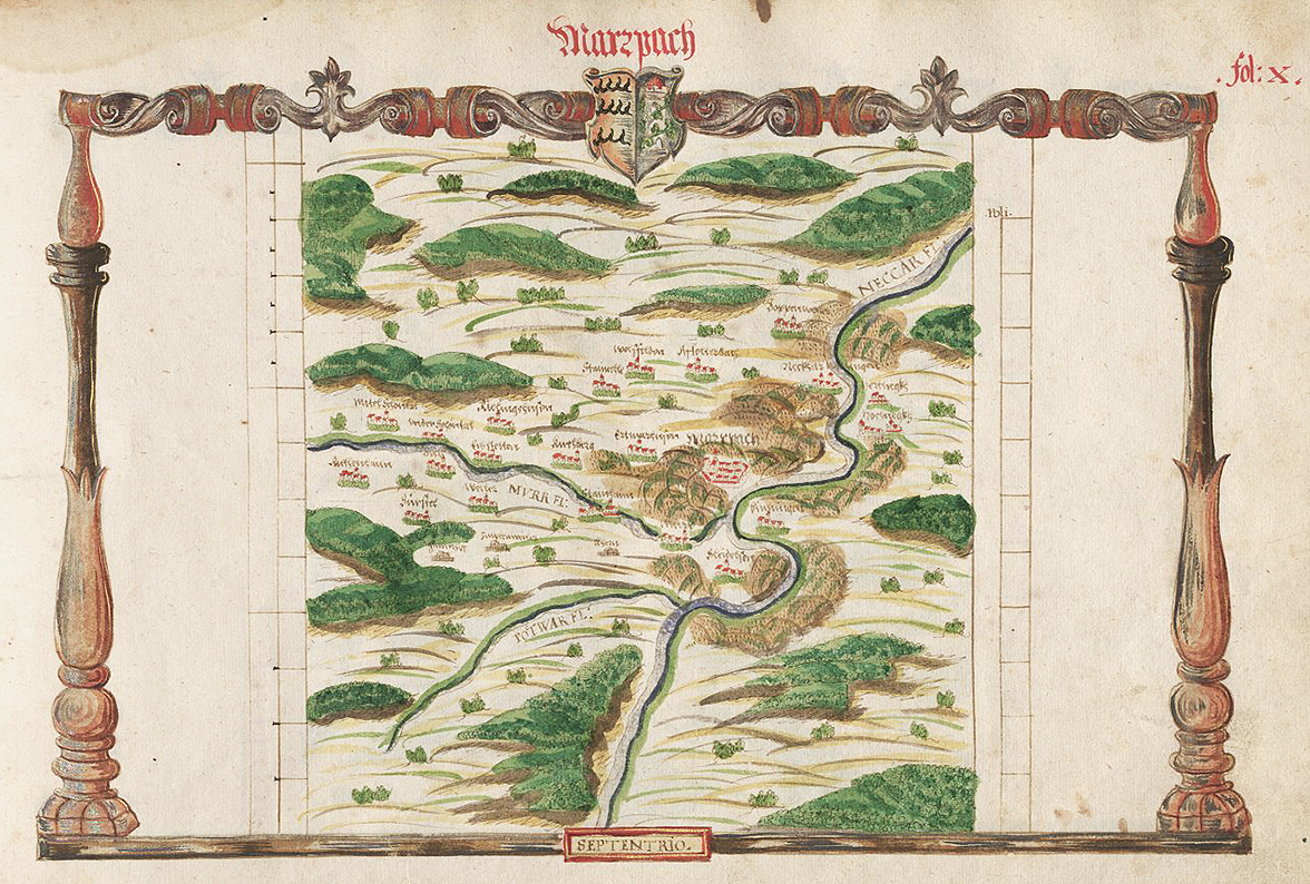 Amt Marbach im Atlas des Herzogtums Württemberg (1575), fol. X - Cod.hist.qt.102; Blatt 35, von Heinrich Schweickher